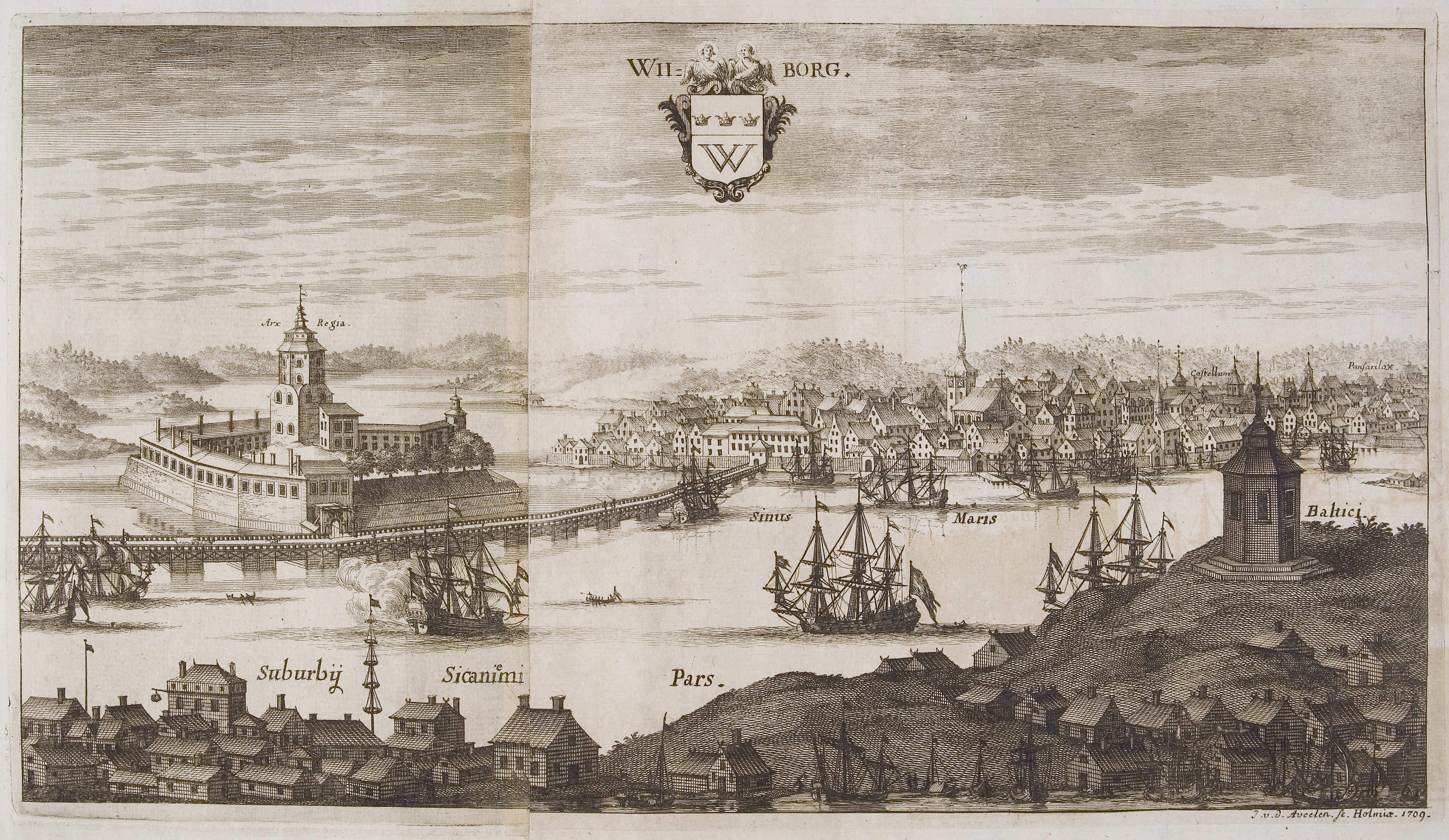 Viipurin kaupunki 1600- ja 1700-lukujen vaihteessa. Kuparikaiverrus teoksesta: Erik Dahlberg, Svecia antiqva et hodierna, Stockholm (1698-1715). Painolaatassa vuosiluku 1709.